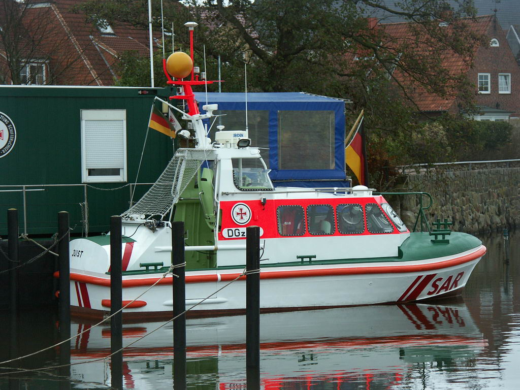 SRB Juist am Liegeplatz in Schleswig